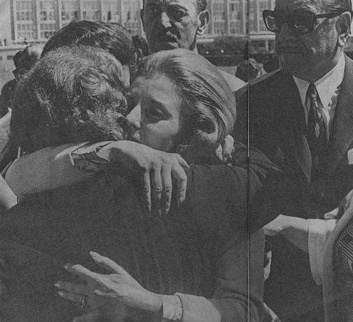 Isabel Perón abraza a las hermanas de Eva Perón, Erminda Duarte de Bertolini y Blanca Duarte de Álvarez Rodríguez. Detrás de ella se puede ver a Héctor José Cámpora, 7 de diciembre de 1971.